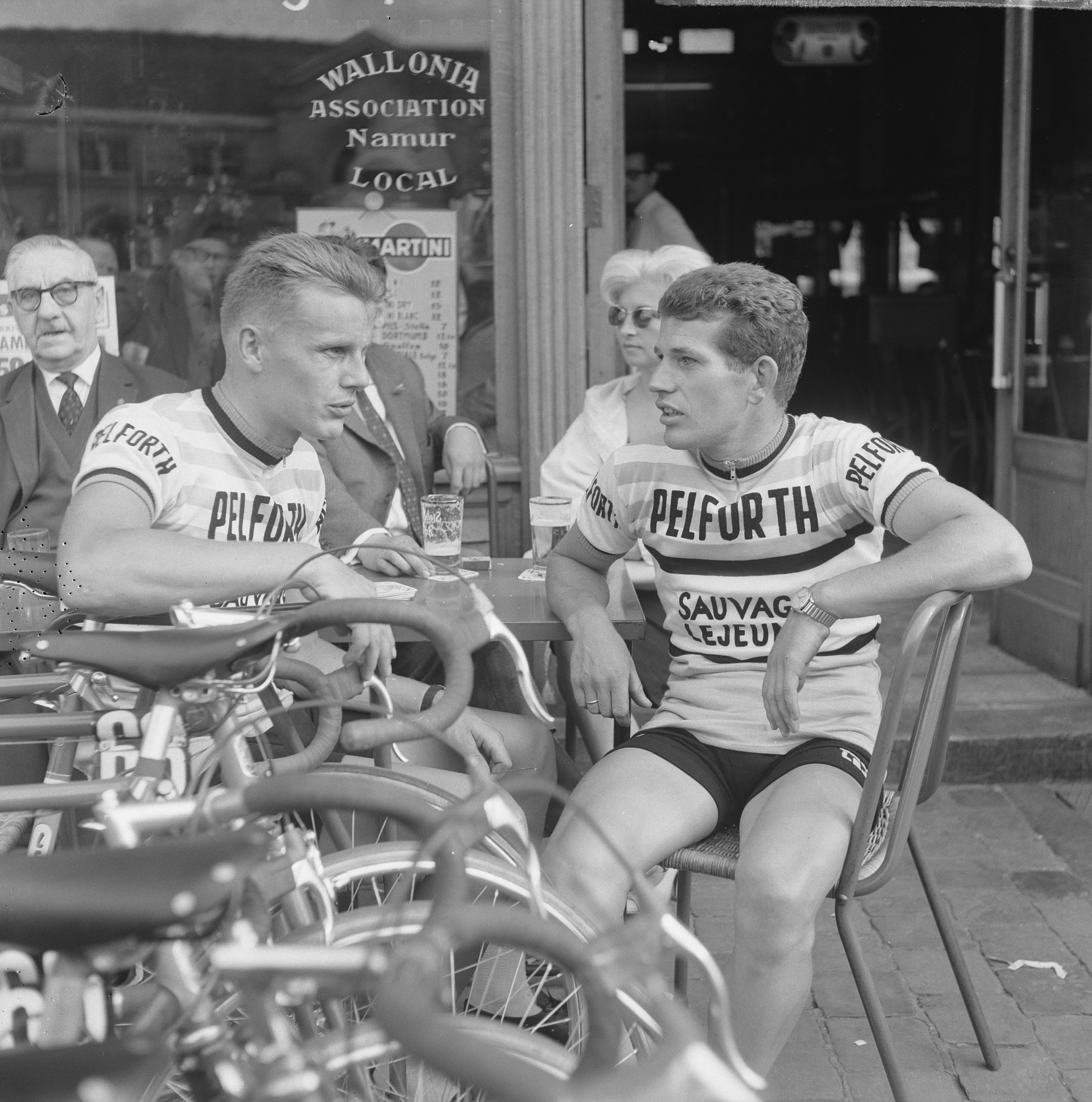 Collectie / Archief : Fotocollectie Anefo Reportage / Serie : Tour de France 1963 Beschrijving : Jan Janssen met zijn ploeggenoot Dick Enthoven op een terrasje Datum : 27 juni 1963 Trefwoorden : terrassen Persoonsnaam : Enthoven, Dick, Janssen, Jan Instellingsnaam : Tour de France Fotograaf : Pot, Harry / Anefo Auteursrechthebbende : Nationaal Archief Materiaalsoort : Negatief (zwart/wit) Nummer archiefinventaris : bekijk toegang 2.24.01.03 Bestanddeelnummer : 915-3055 Depicted people: Jan Janssen and Dick Enthoven